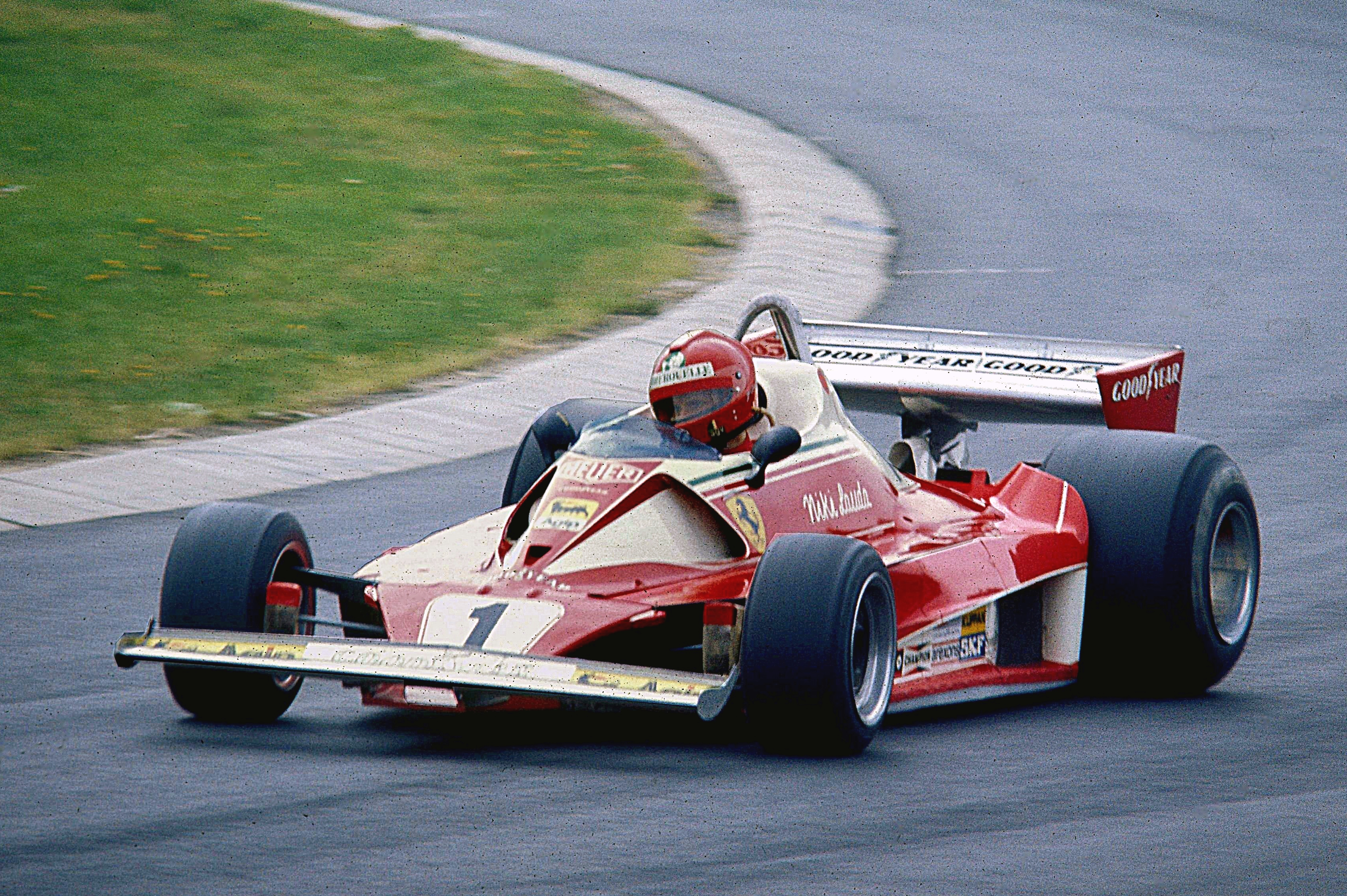 Niki Lauda im Ferrari 312 T2 beim Training zum GP von Deutschland auf dem Nürburgring in der Südkehre